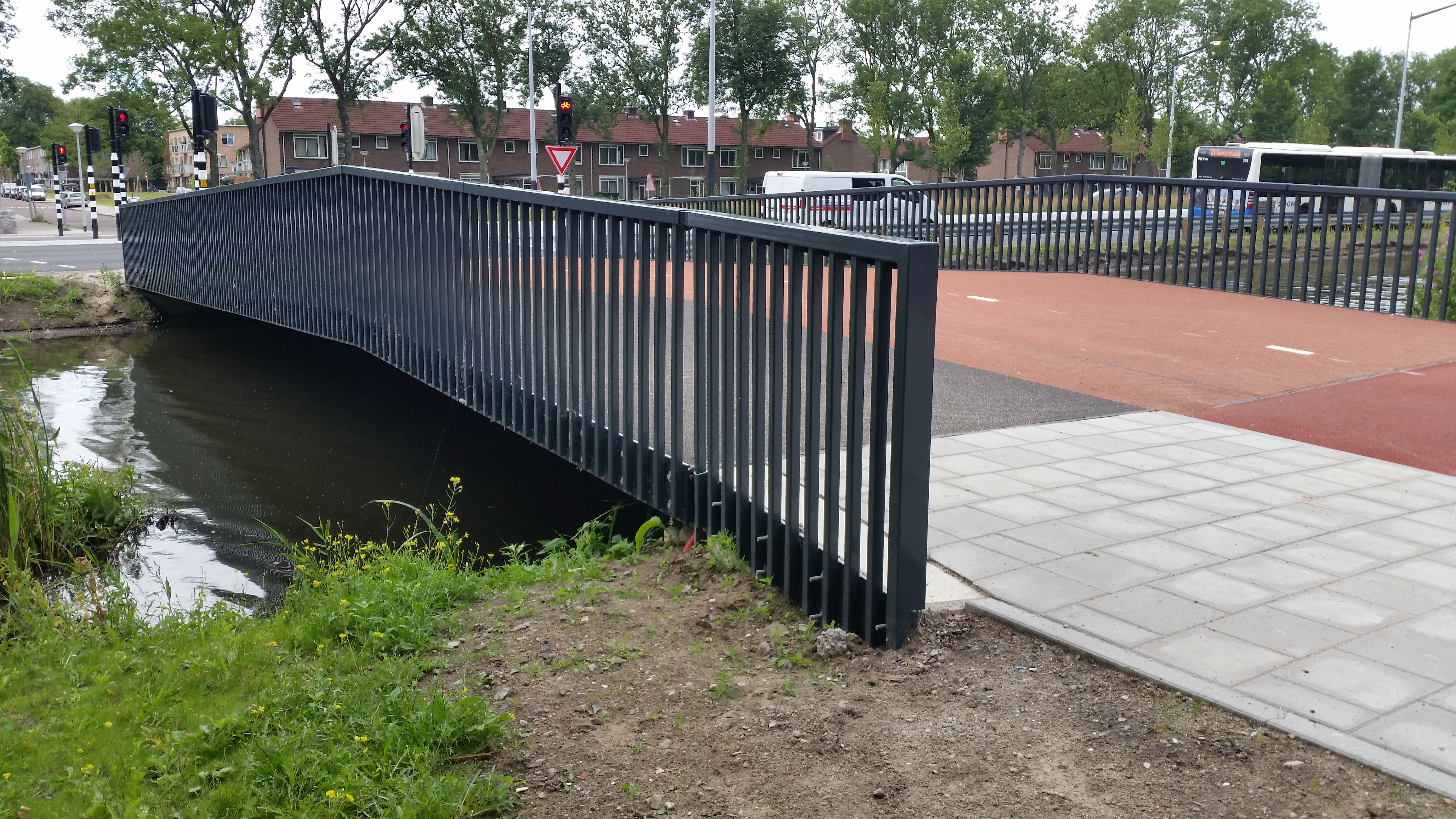 Impressie van de net geopende Eliasbrug uit 2019/2020 over de Haarlemmertrekvaart, Amsterdam Nieuw-West